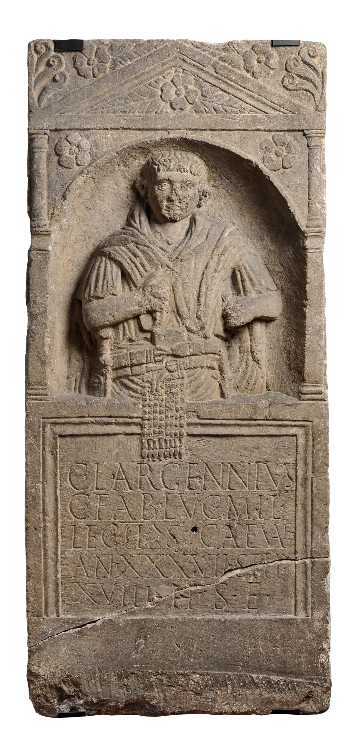 La stèle funéraire du légionnaire Largennius (1er siècle après J.-C.)